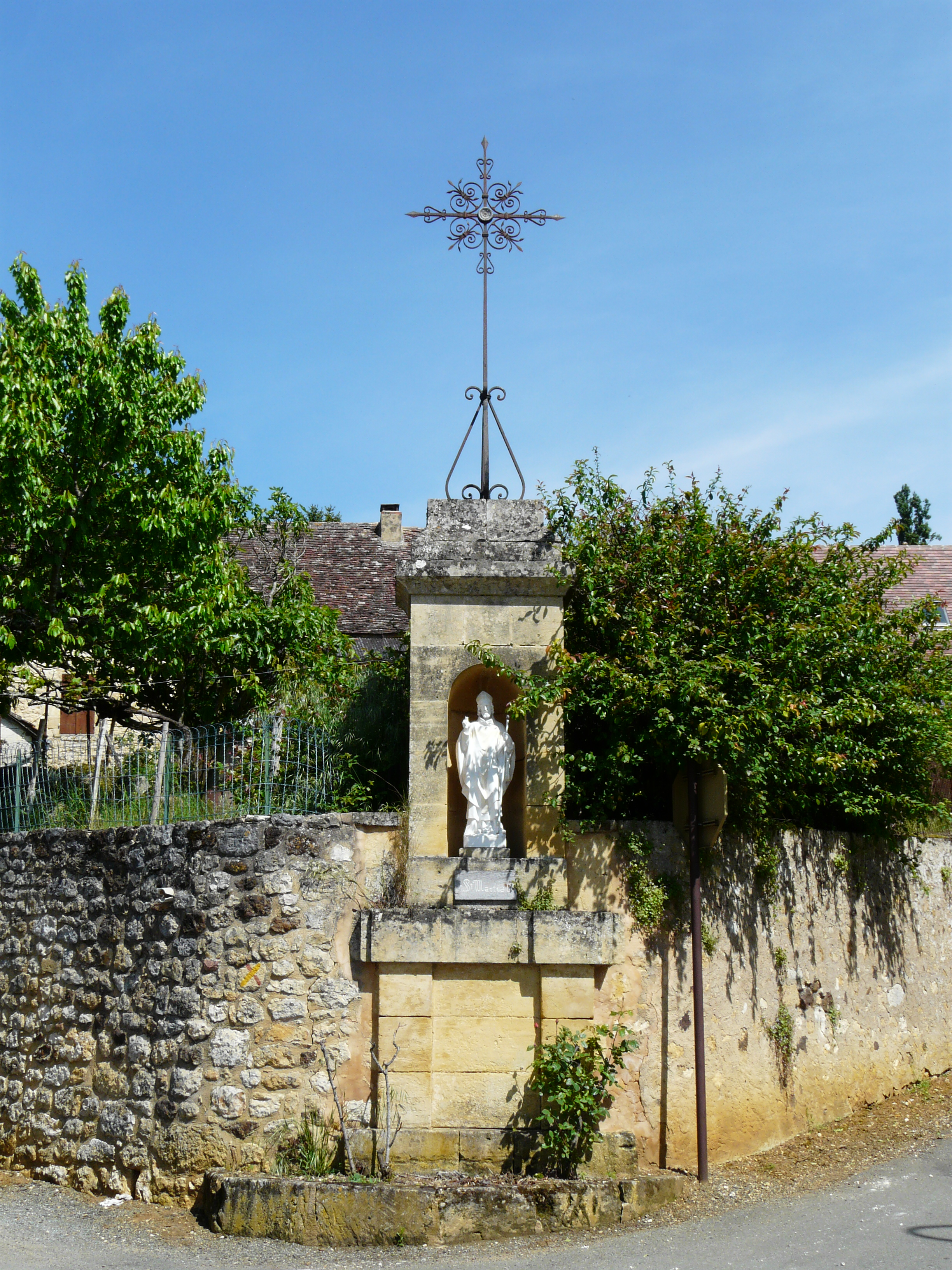 Croix et statue de saint Martial au nord de l'église, Monsac, Dordogne, France.